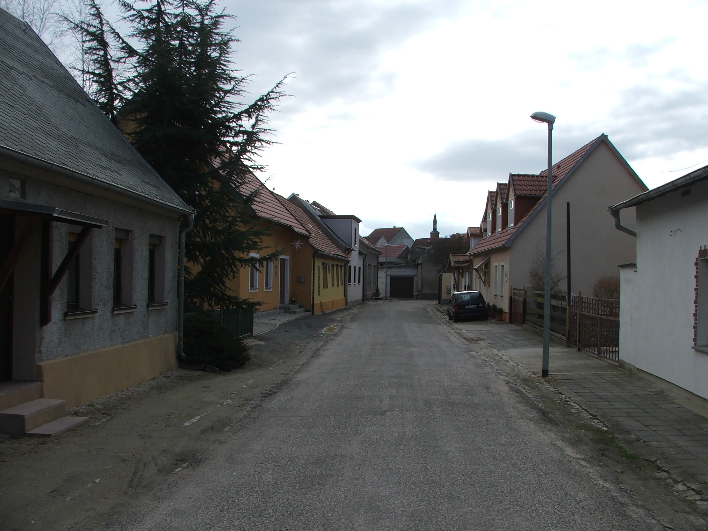 Fischergasse, ehemals Stadtwinkel bei Liebenwerda